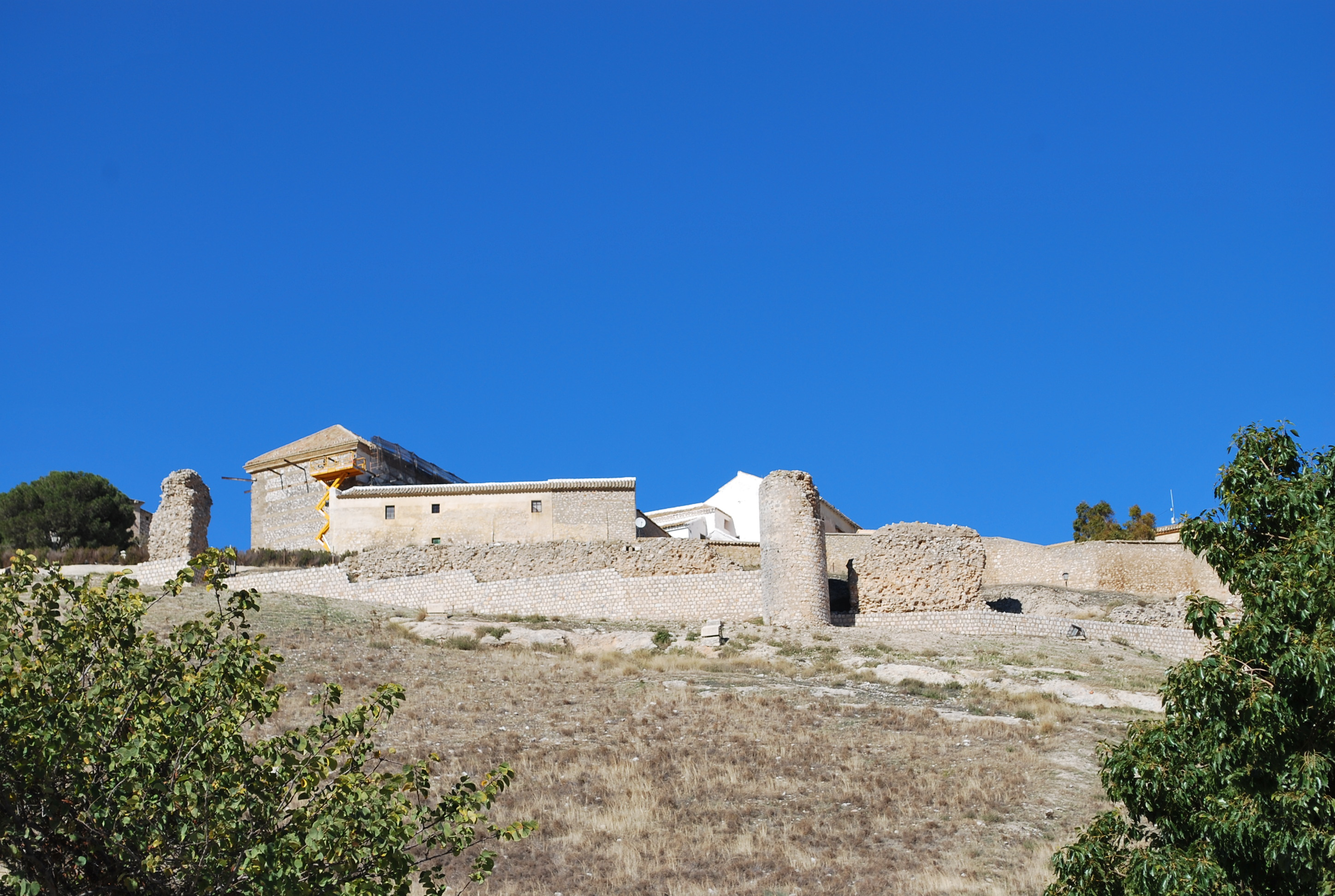 Castillo-palacio árabe de la ciudad de Estepa